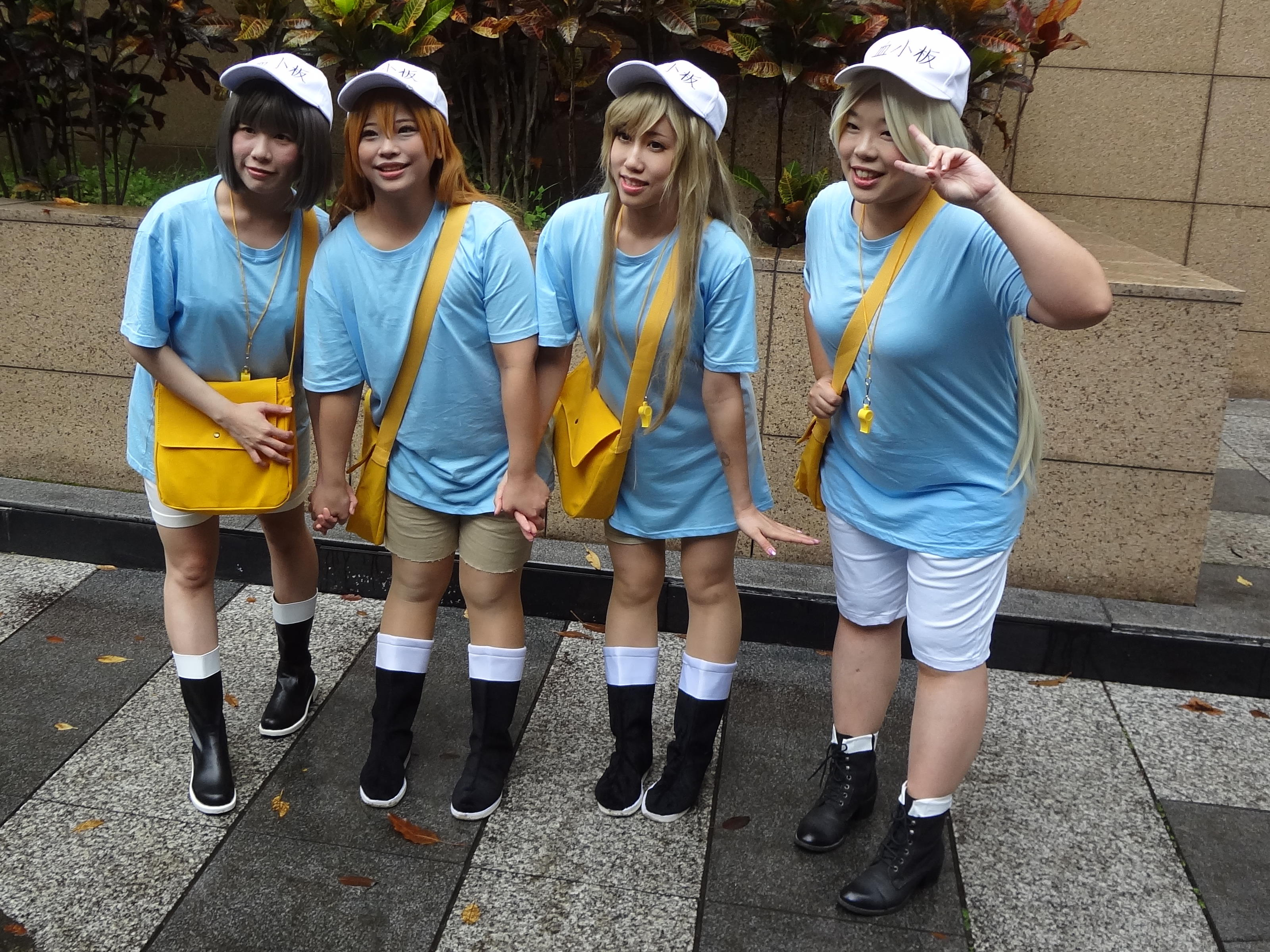 第50屆台灣同人誌販售會，《工作細胞》血小板cosplayer四人。